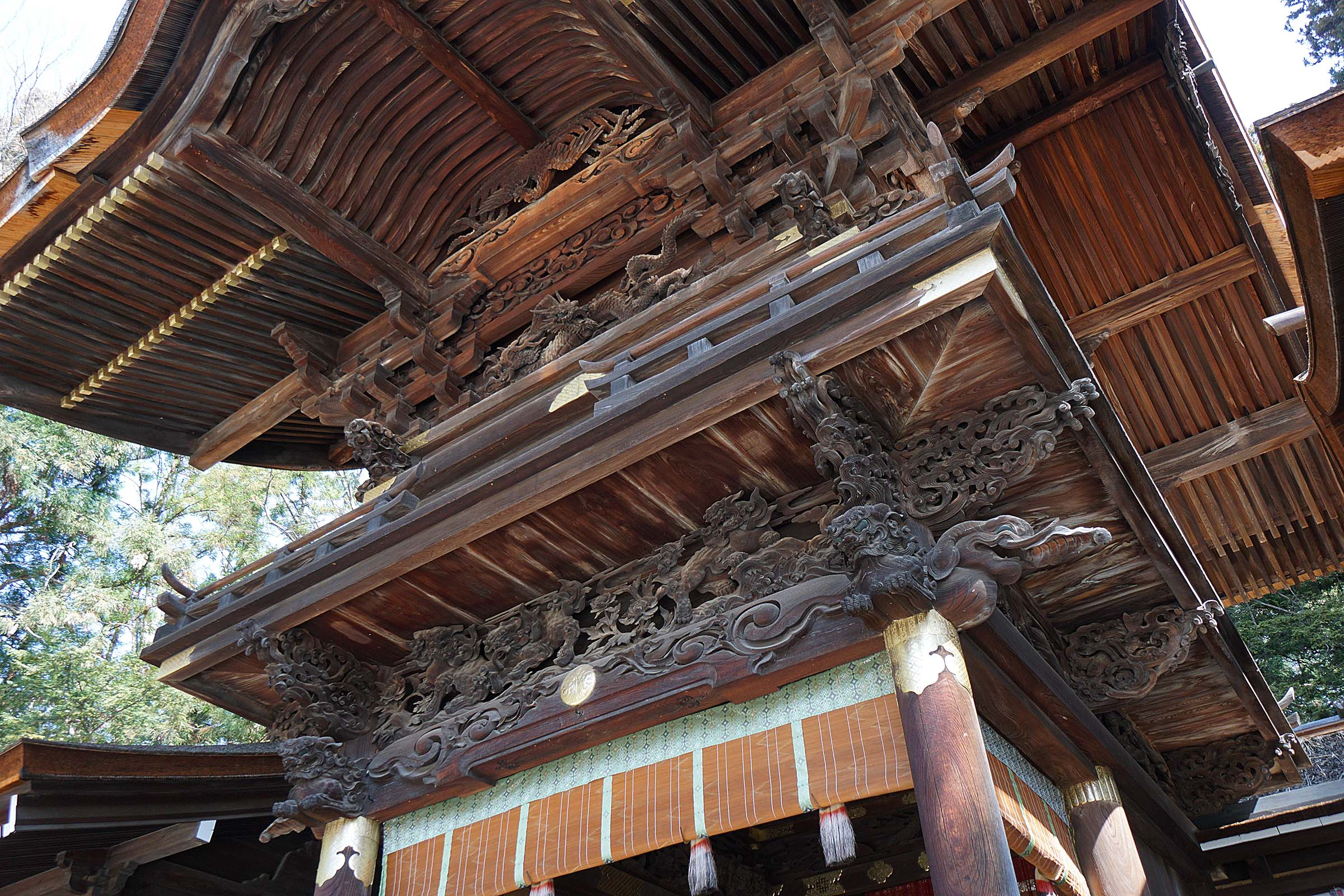 Suwa taisha Shimosha Akimiya , 諏訪大社 下社 秋宮